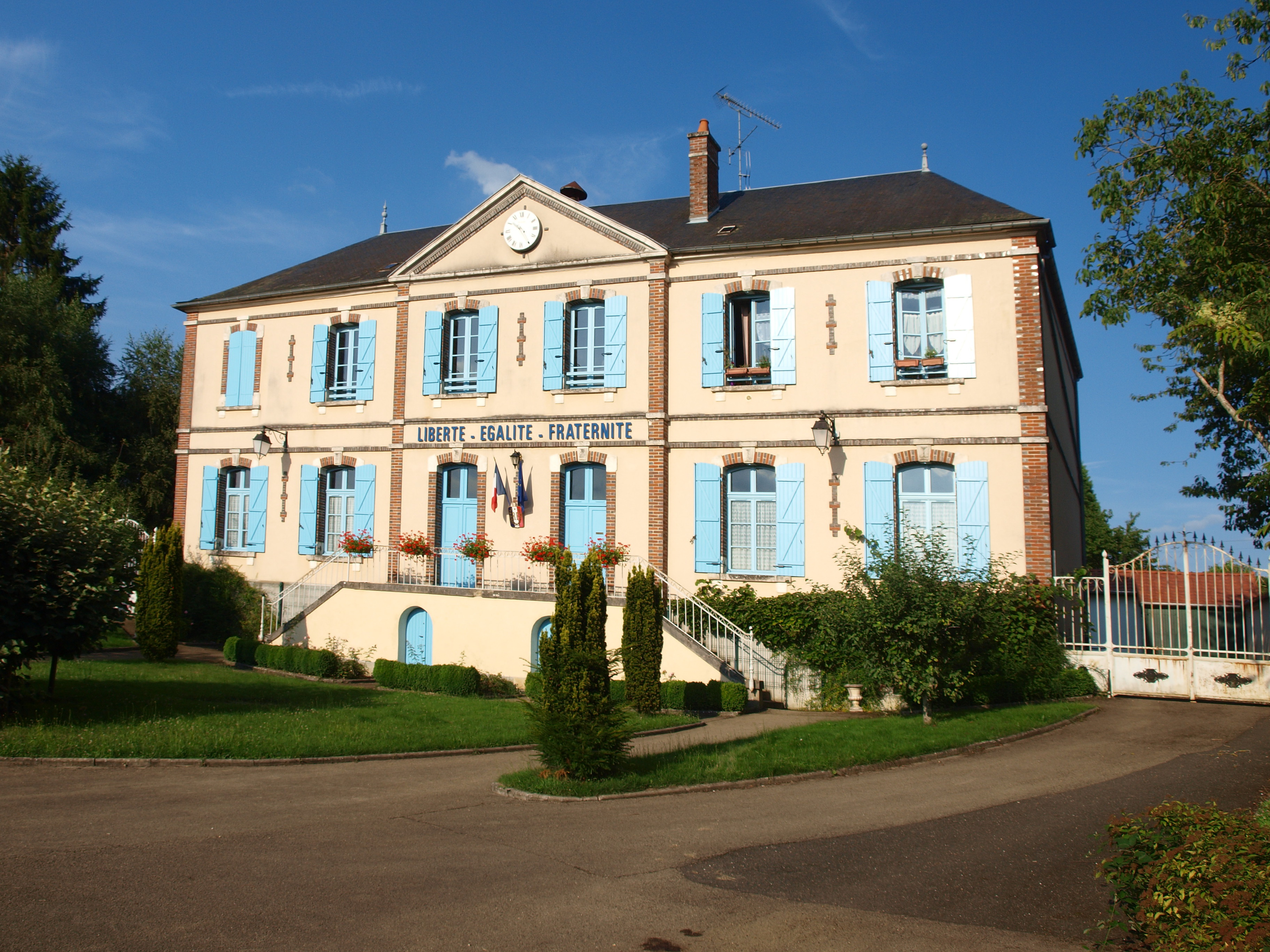 Villeneuve-les-Genêts (Yonne, France) ; mairie